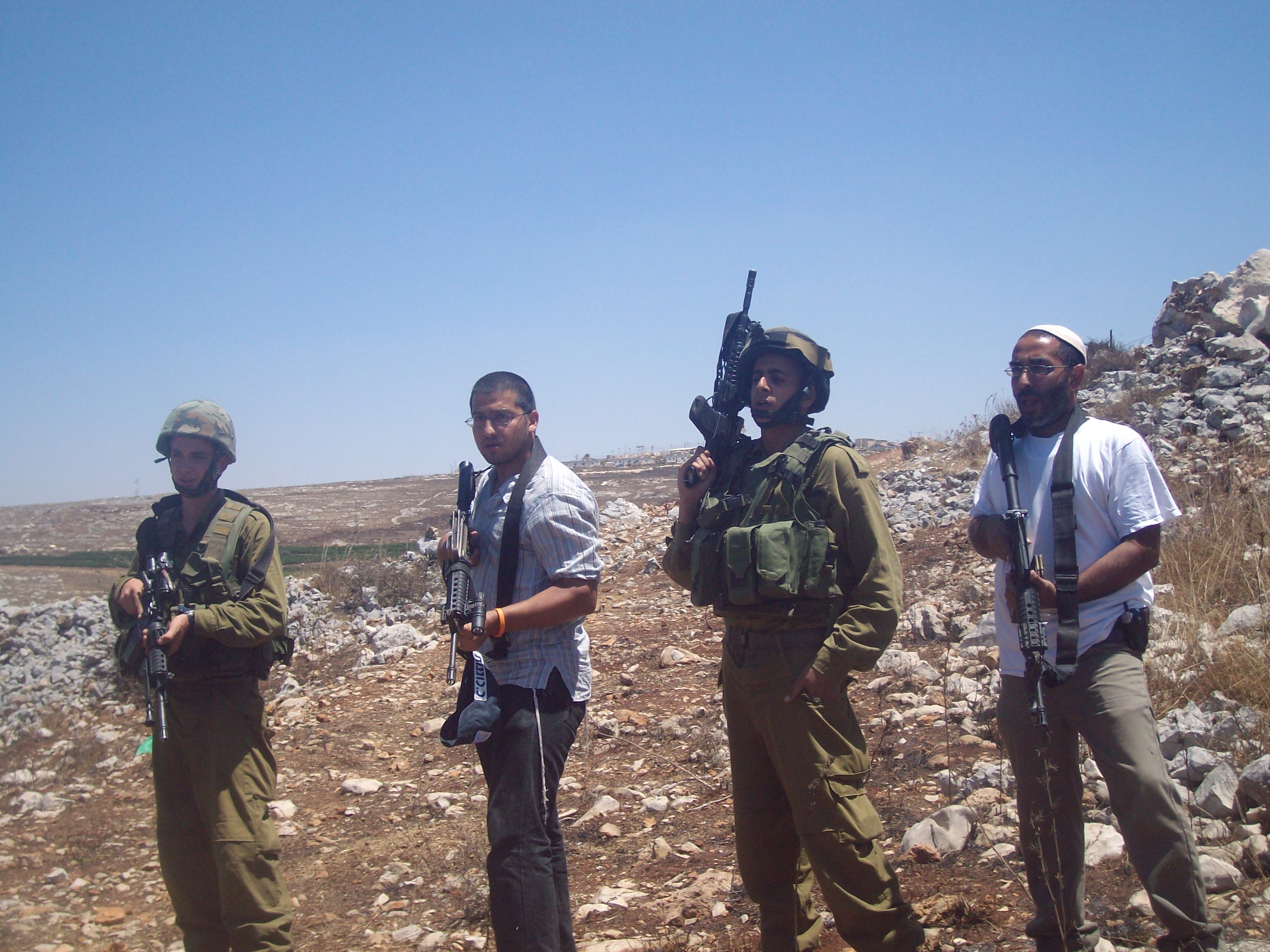 IDF soldiers and Israeli settlers